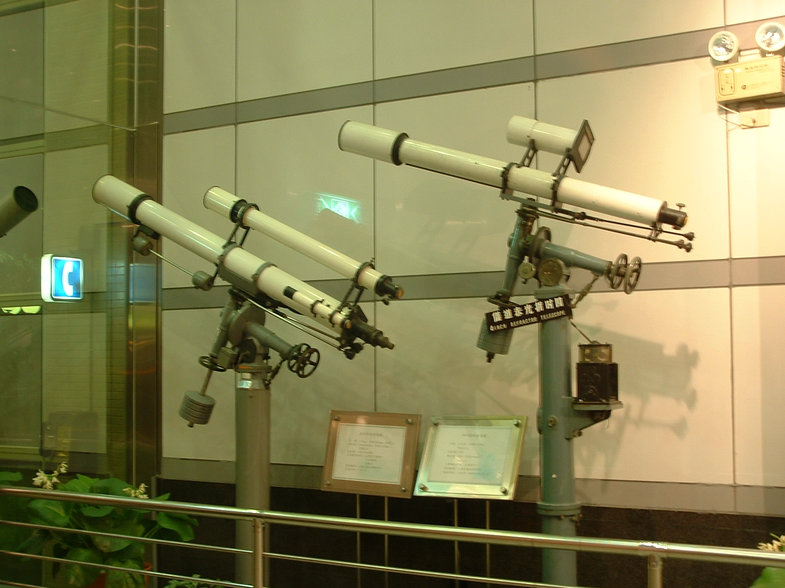 臺北市立天文科學教育館內公眾大廳（不用買票的自由進出區）中擺設的折光赤道儀。